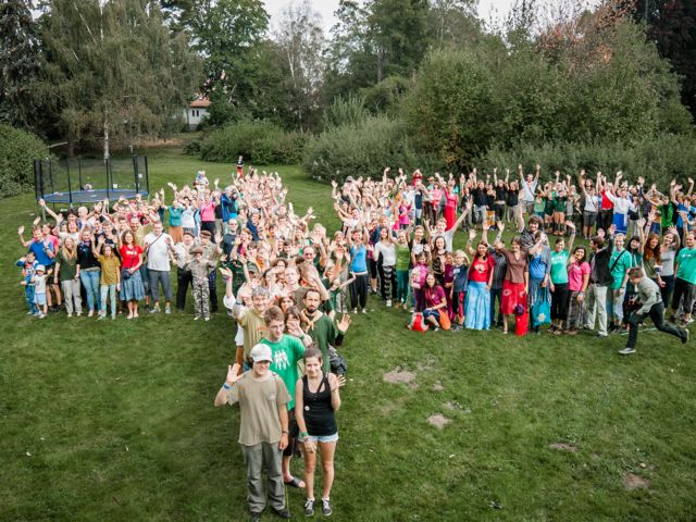 Fotografie účastníků z oslav 40 let Hnutí Brontosaurus ve tvaru "40 let".